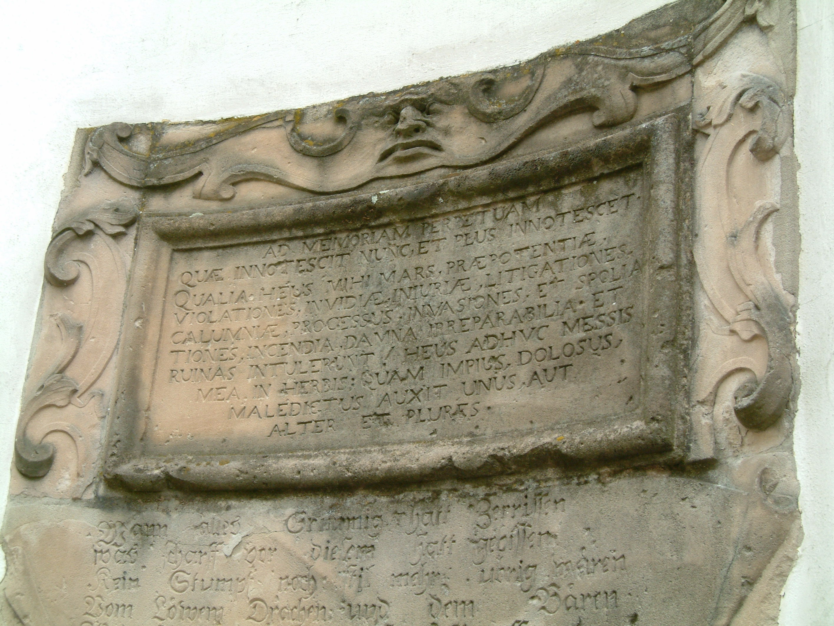 Michelstor-Inschrift links am Sturmfederschen Schloss zu Dirmstein, selbst fotografiert am 19.05.2006 und freigegeben durch Benutzer:Mundartpoet